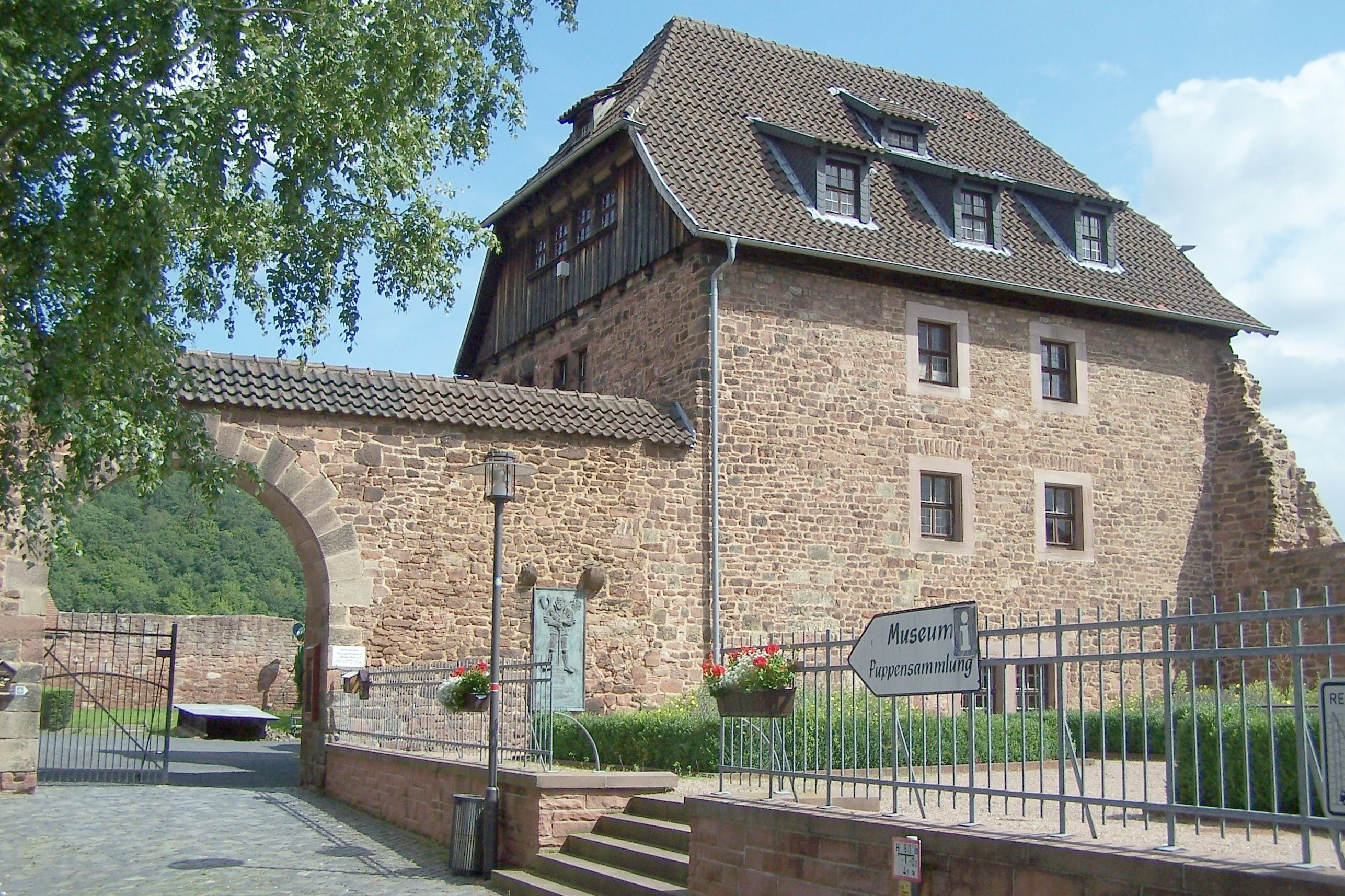 Hof- und Au�enansichten der Burganlage.